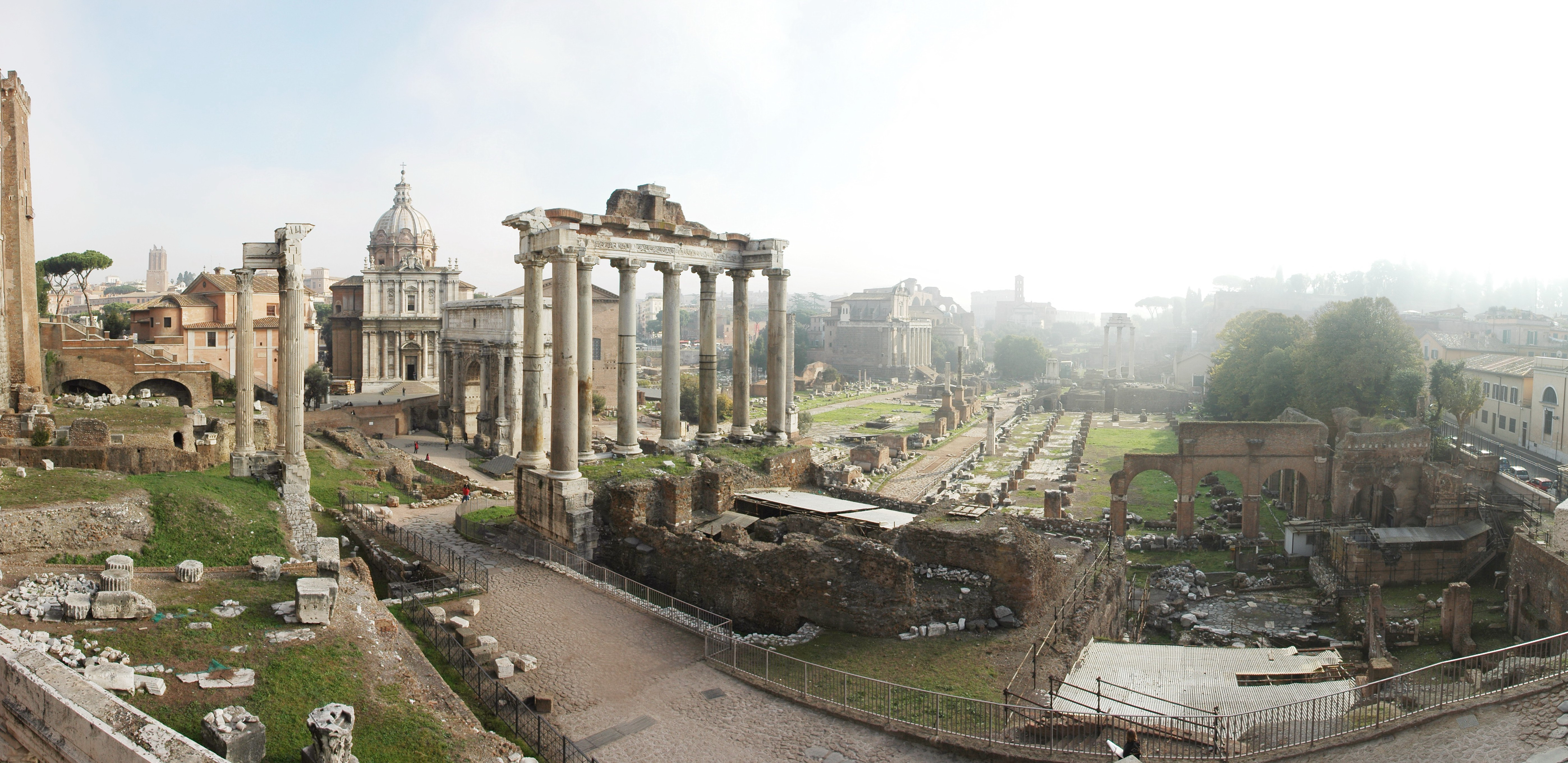 Vista panorámica del Foro imperial de Roma.